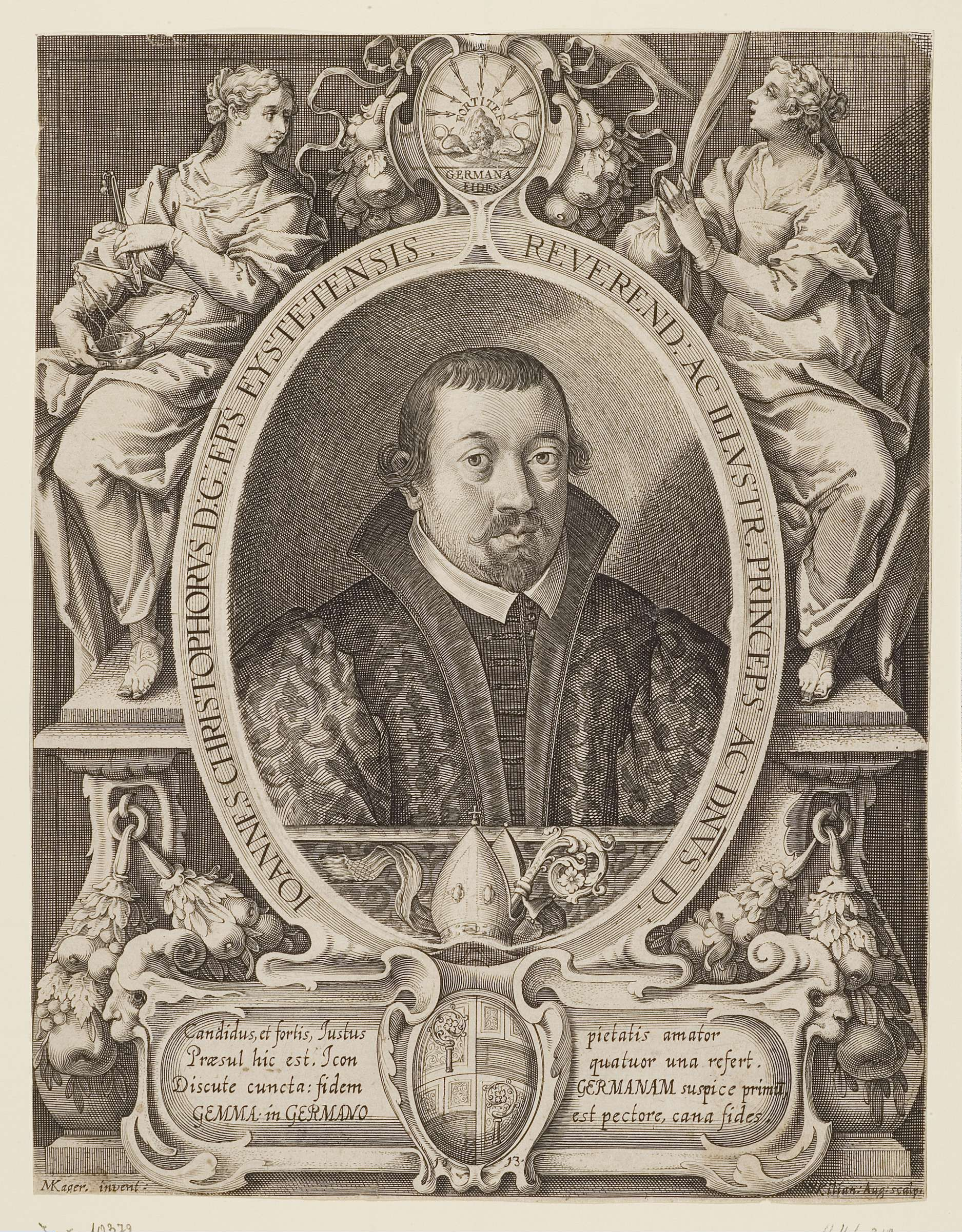 Portrait des Johann Christoph von Westerstetten (1563-1637), Fürstbischof von Eichstätt.